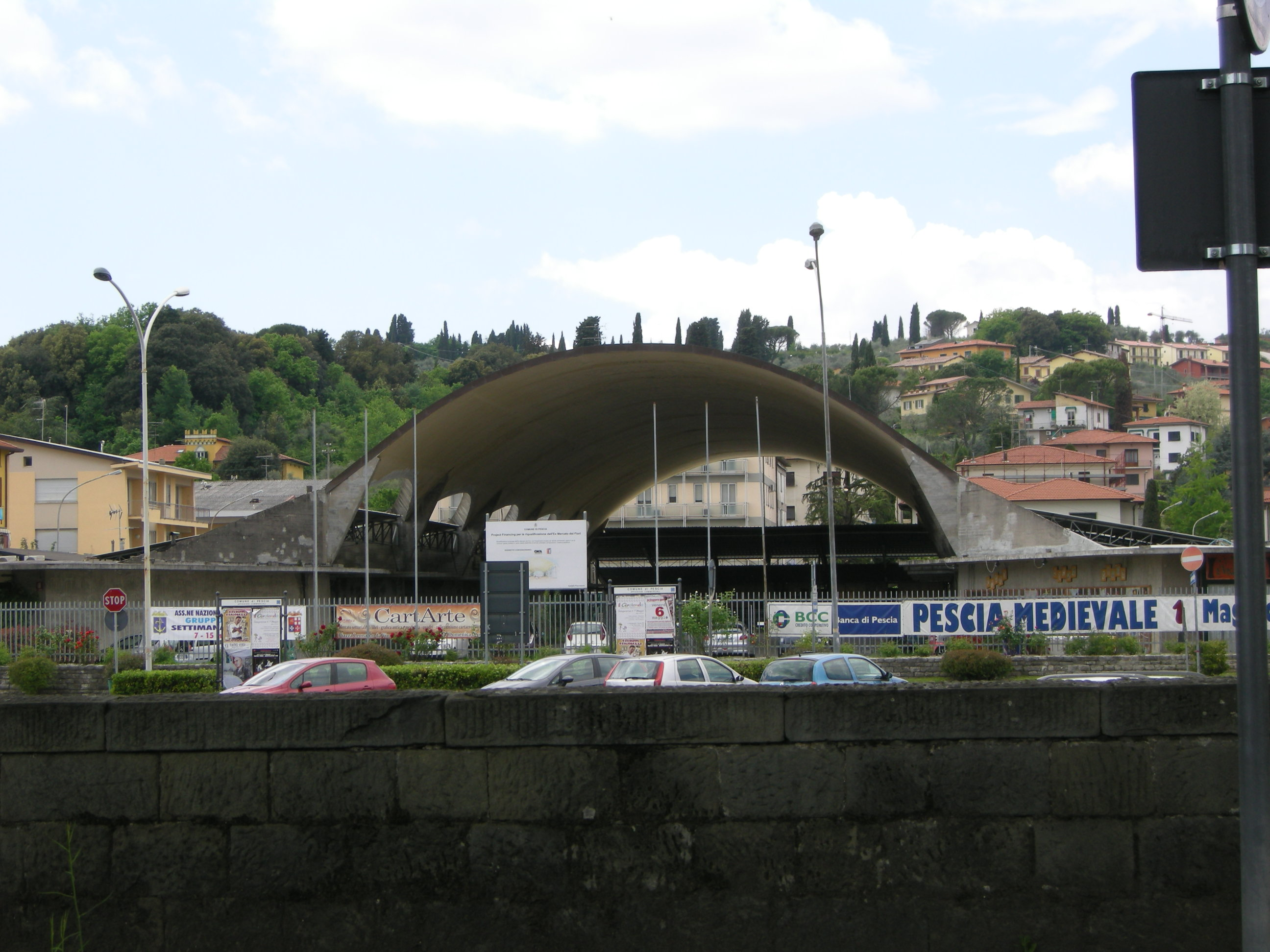 Mercato vecchio di pescia